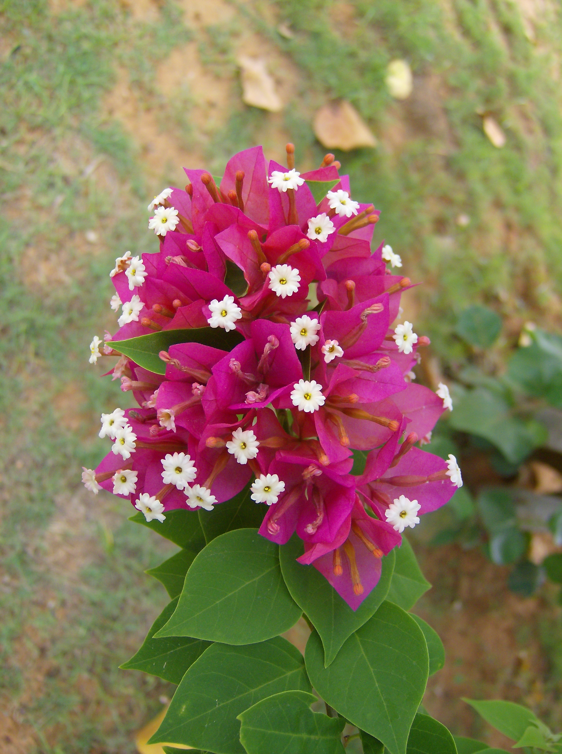 Bougainvillea. El género Bougainvillea conocido con el nombre común de buganvilia (preferido por el DPD), buganvilla (España), bugambilia (México), veranera (Colombia y Panamá), trinitaria (Colombia, Cuba, Panamá, Puerto Rico, República Dominicana y Venezuela) o Santa Rita (Argentina, Bolivia, Paraguay y Uruguay) es un género de plantas originarias de América del Sur. Su nombre deriva de Louis Antoine de Bougainville, un militar francés que descubrió la planta en Brasil en el año 1768.